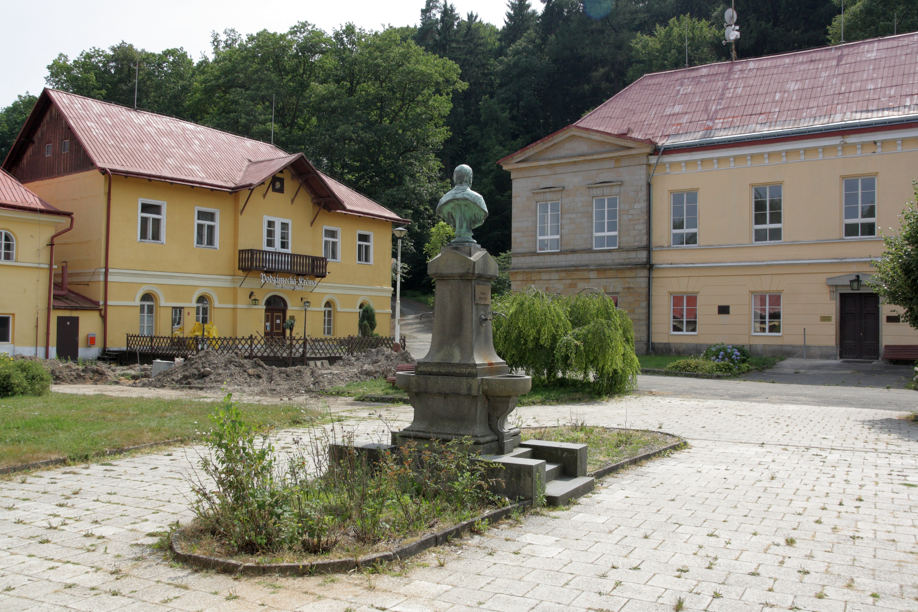 Lázně Sedmihorky - pohled od kolonády